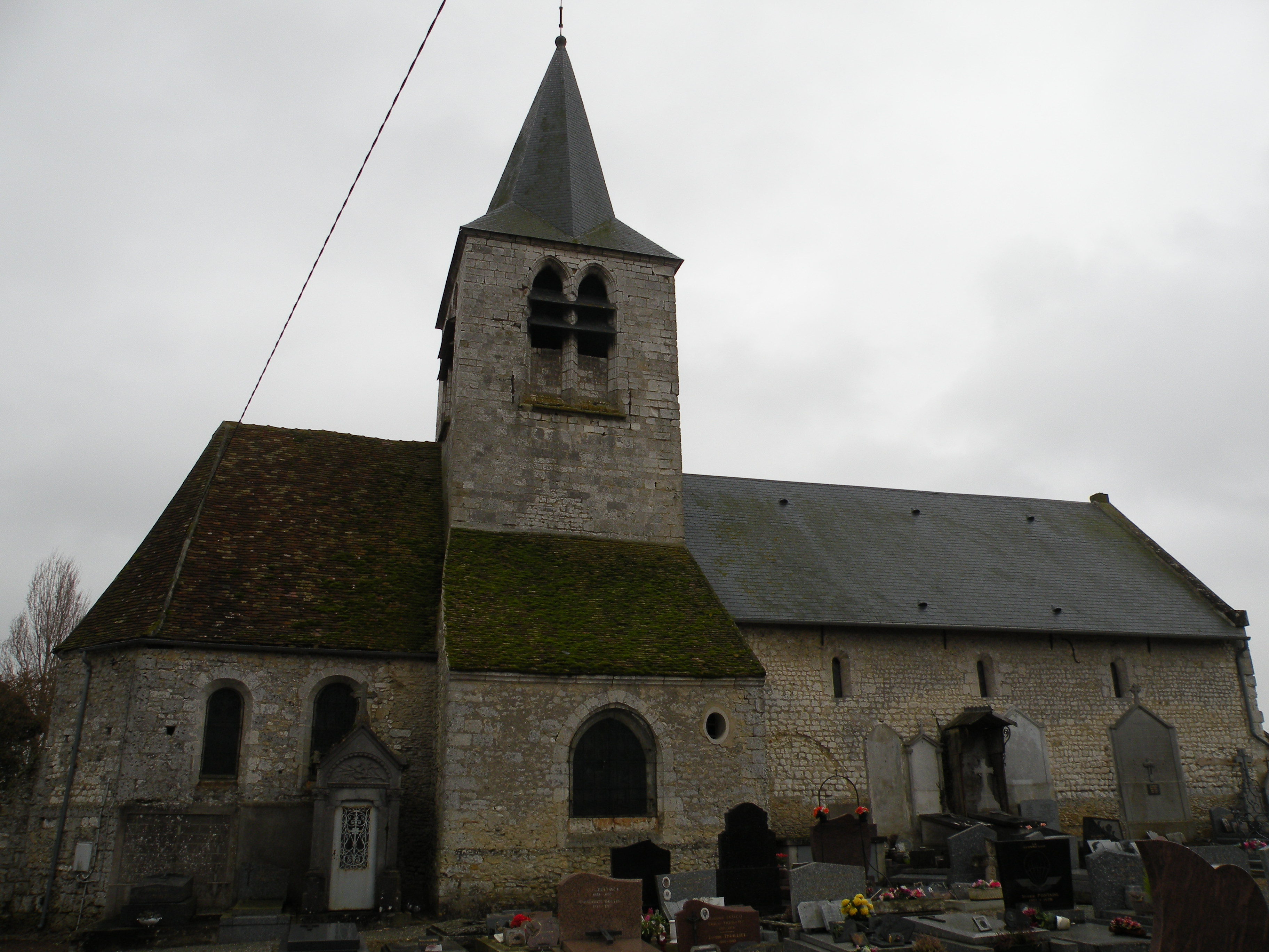 mur nord de l'église d'Abbecourt